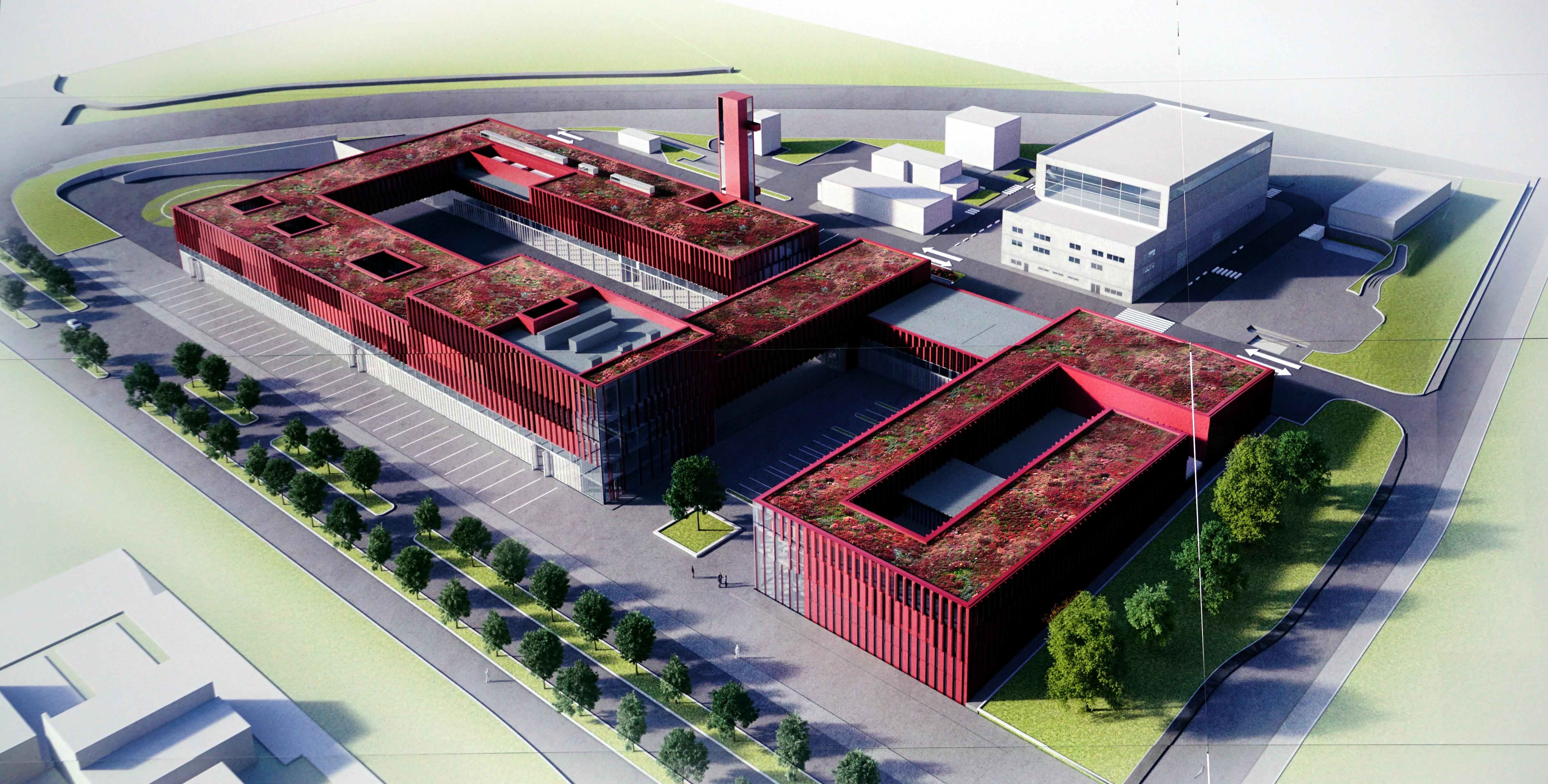 La Maquette du CNIS représentée sur un panneau du chantier de construction